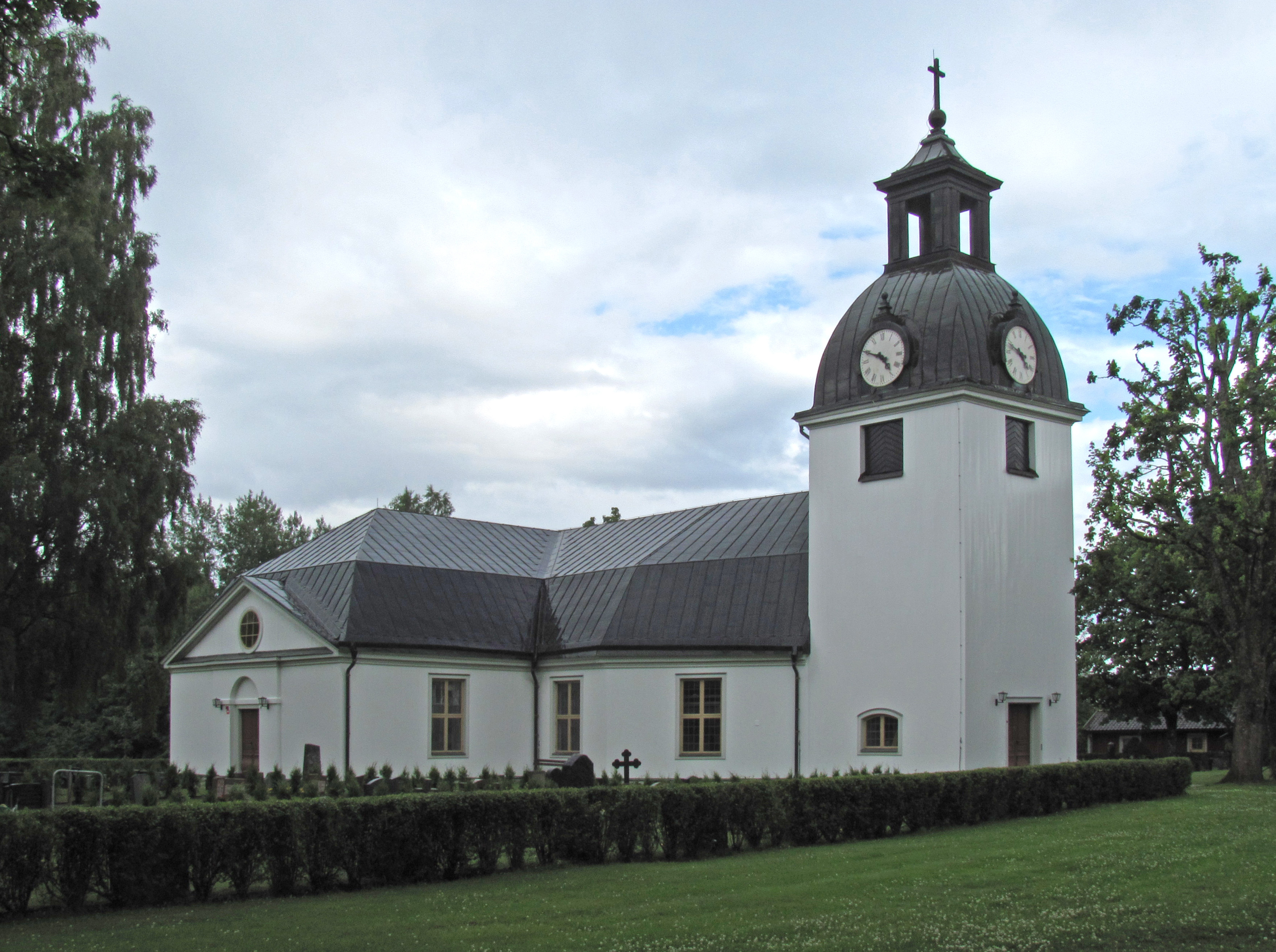 Järnboås kyrka